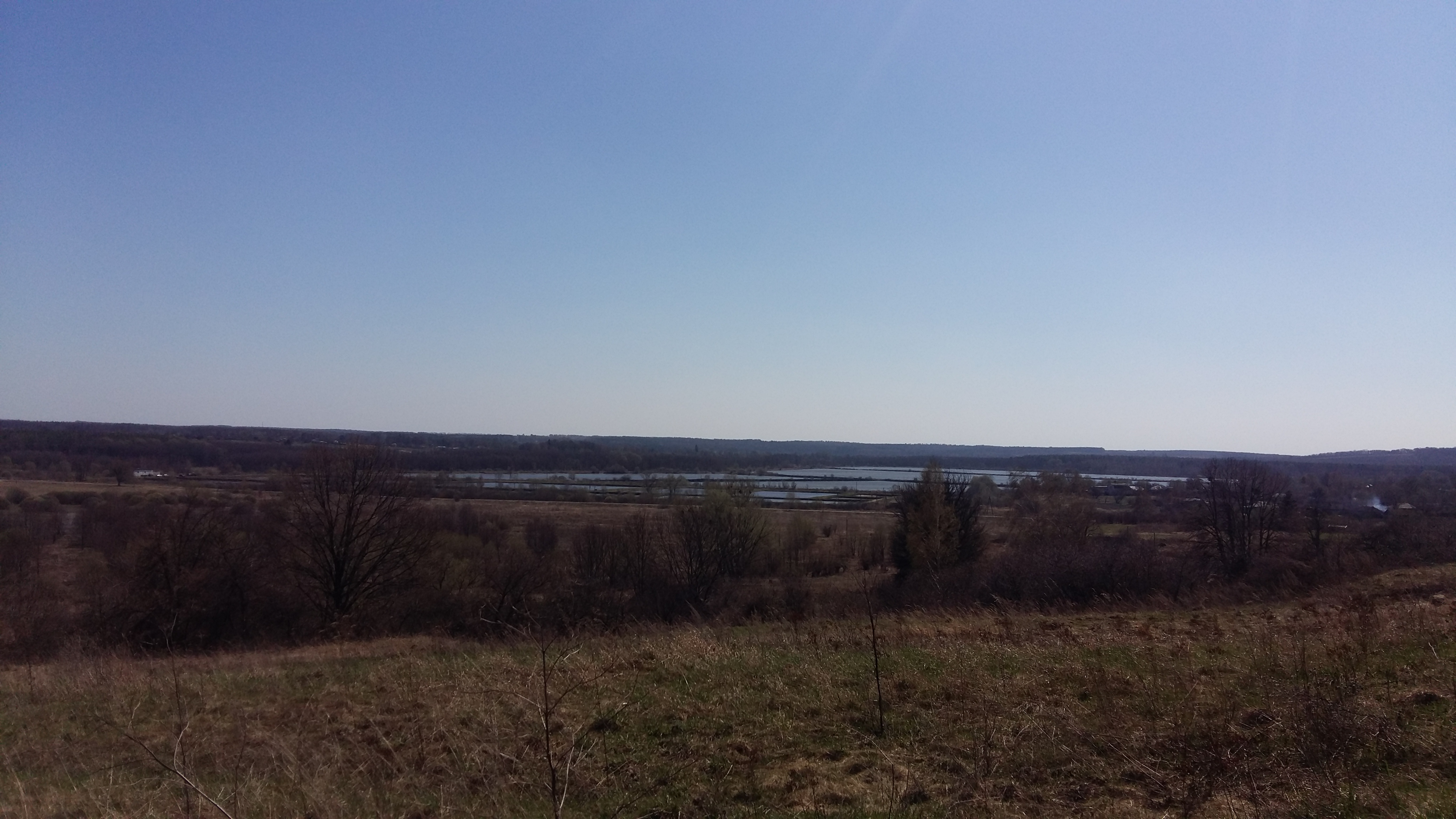 Красоты с. Викторово